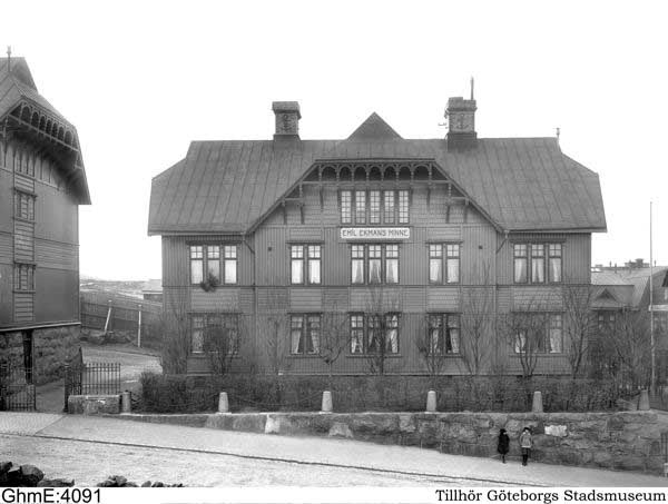 Emil Ekman minne, Sjömannasällskapets byggnad, Sjömansgatan 5. Fotograf Arvid Posse. GSM.